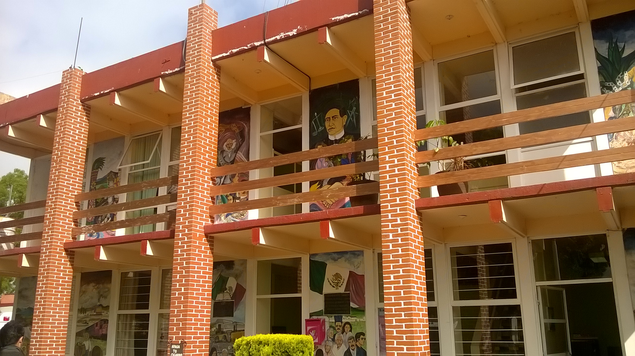 Muñoz de Domingo Arenas, Tlaxcala